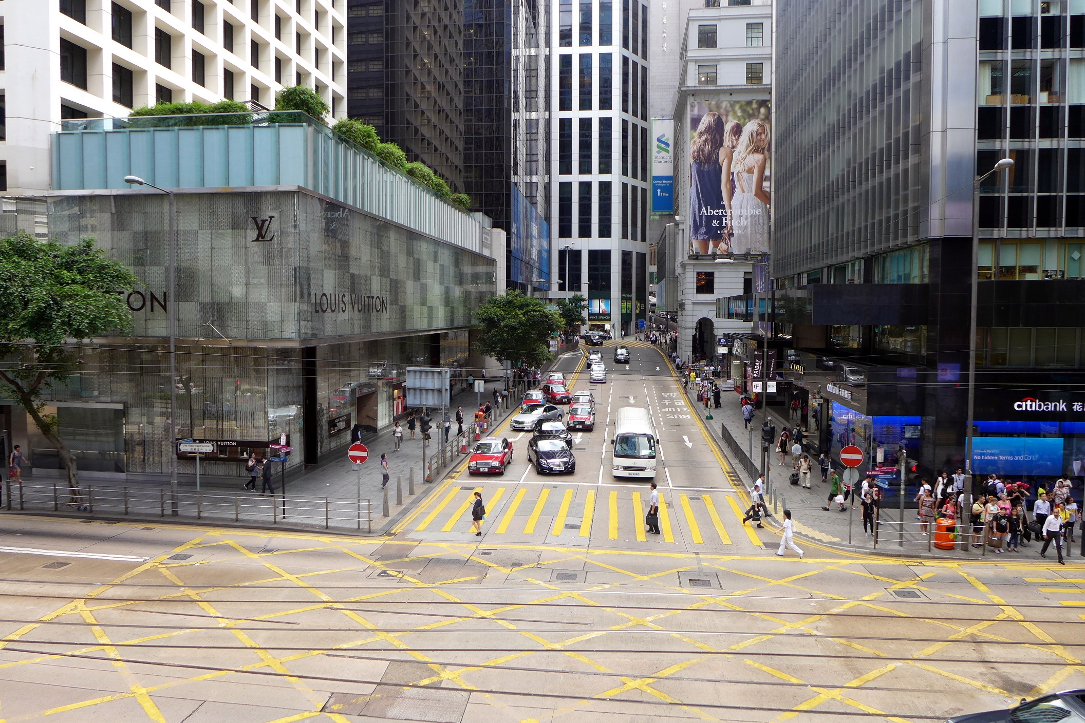 Pedder Street, Central